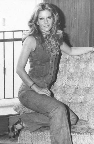 Fotografía blanco y negro sobre papel fotográfico brillante. Retrato de Graciela Alfano en primer plano, de cuerpo entero, sentada en el brazo de un sillón de tapizado floreado. Mira a cámara, sonríe y apoya el brazo izquierdo sobre el respaldo del sillón. Viste pantalón de jean, sandalias con plataforma, pañuelo anudado al cuello, y chaleco de jean que cierra al frente con botones.